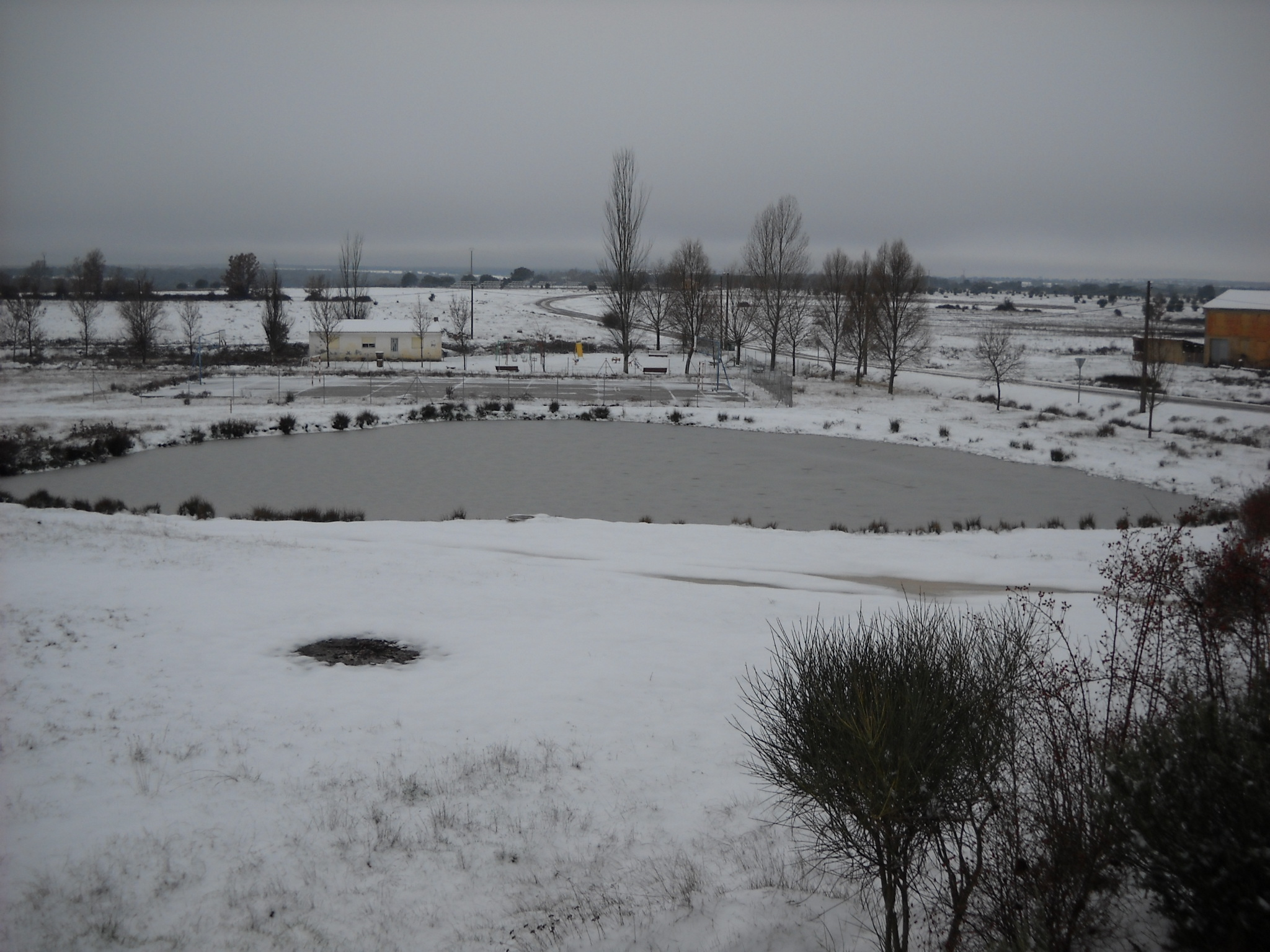 Foto de la laguna de Cubo de Benavente